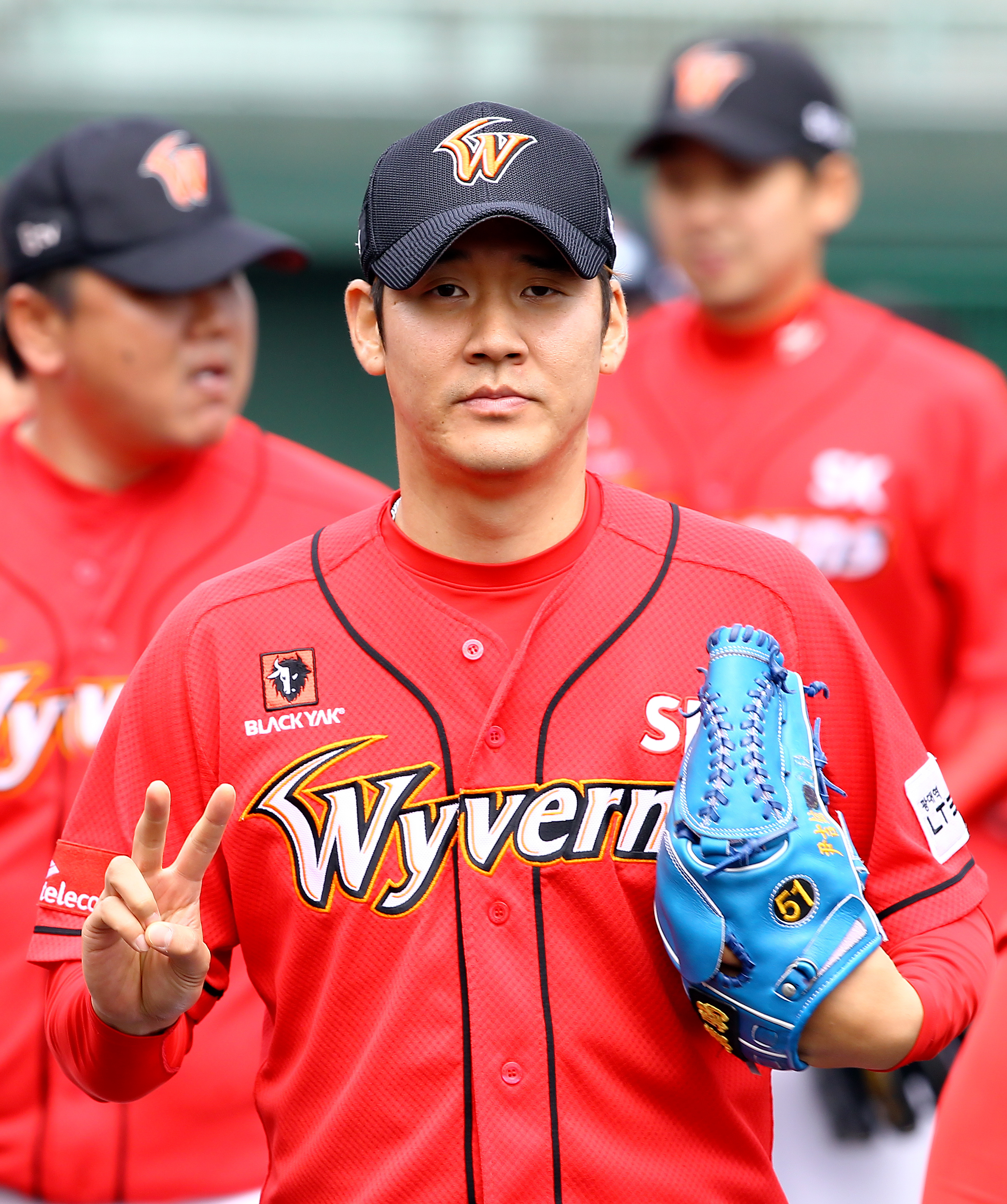 SK 와이번스 투수 윤길현